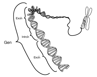 Se muestra la región codificante en un segmento de un DNA de un eucariota